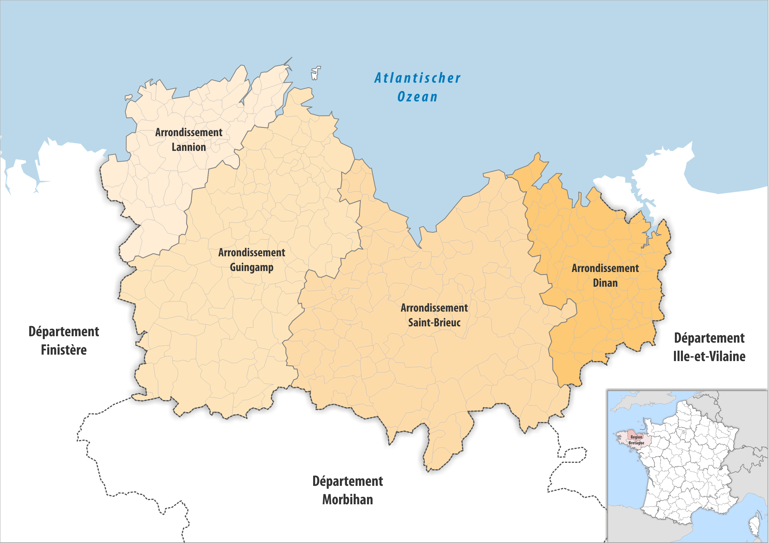 Gemeinden und Arrondissemente im Departement Côtes-d’Armor